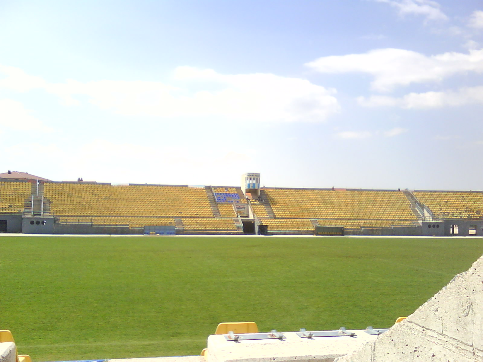 Mokri Dolac football stadium in Posušje